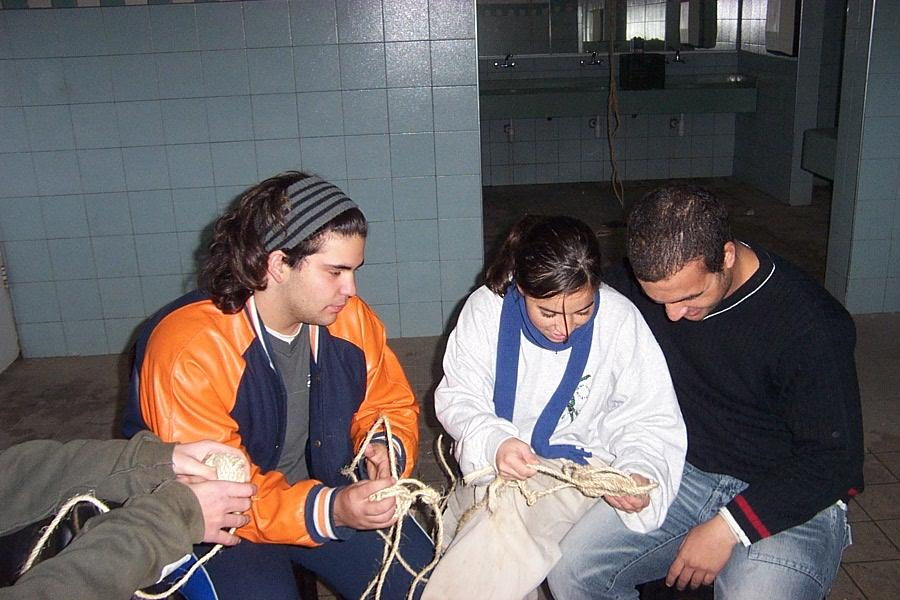 עמלנות - מכינים ראש טורקי